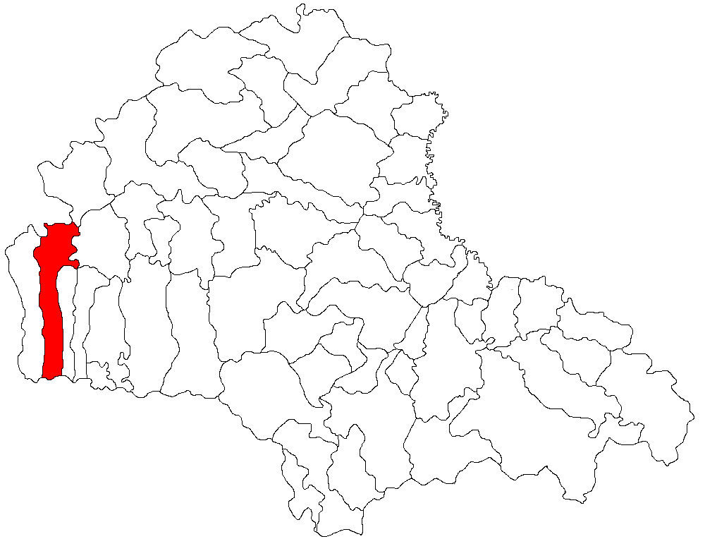 Categorie:Hărţi ale judeţului Braşov